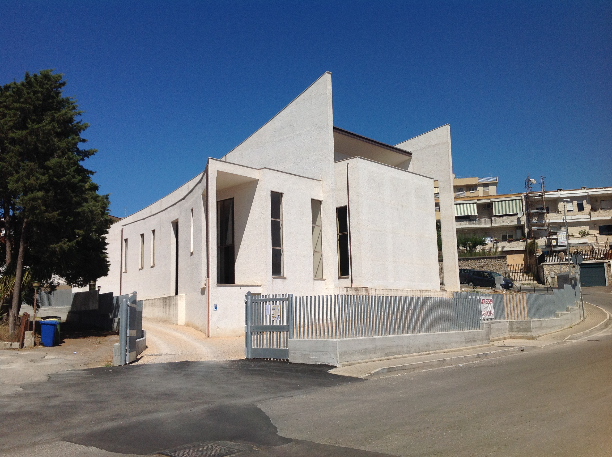 Esterno del retro della chiesa.